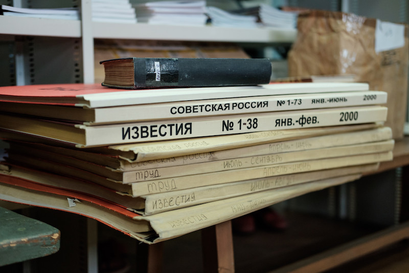 Государственное бюджетное учреждение культуры г. Москвы «Центральная универсальная научная библиотека имени Н.А. Некрасова» Главное здание Библиотеки им. Н.А. Некрасова 105005, Москва, ул. Бауманская, д. 58/25, стр. 14 (м. «Бауманская»)